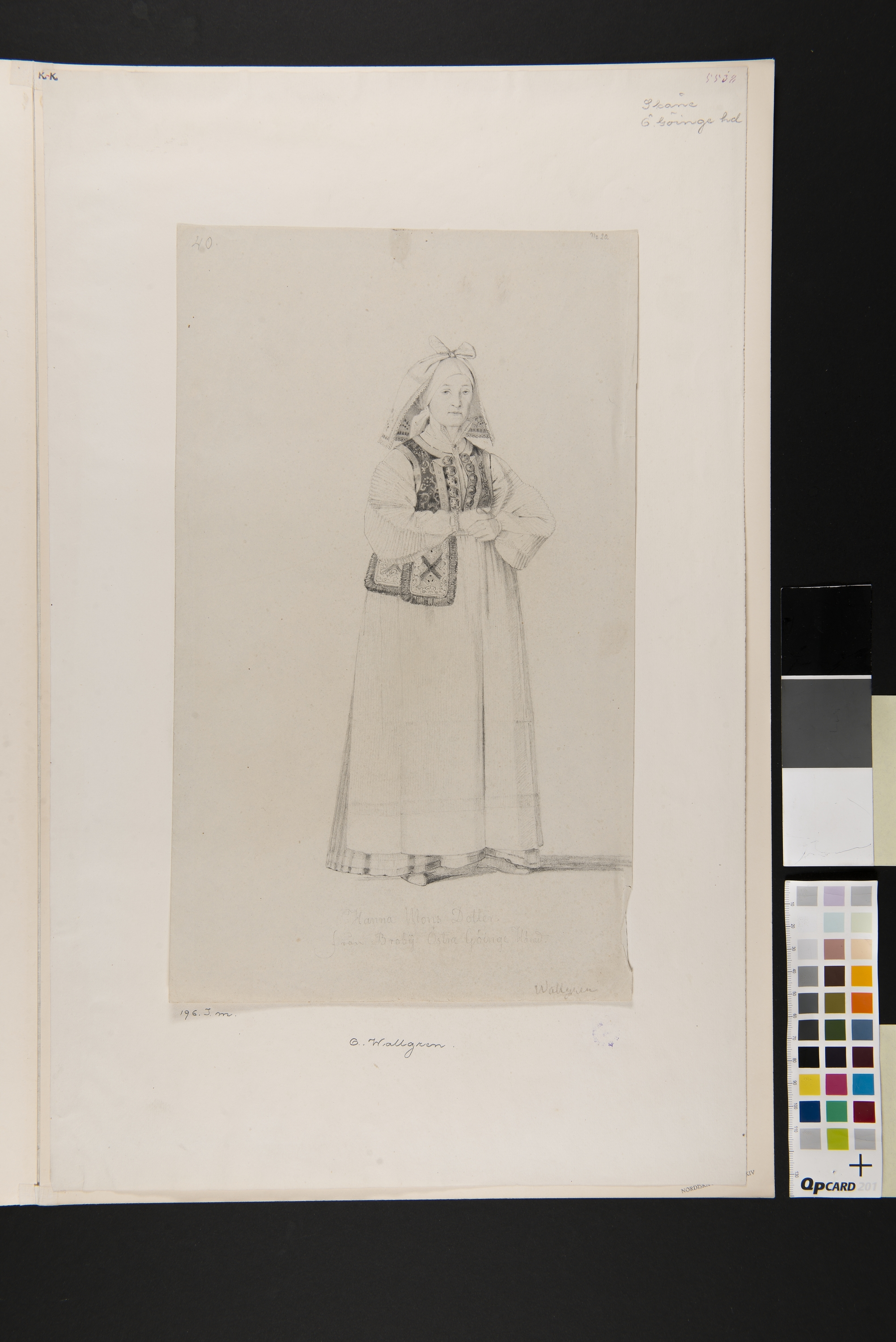 Dräkt. Akvarell i storformat av O. Wallgren Depicted place: Q3591663 (Q3591663) (Härad), Sweden (Q34) (Land), Scania (Q180756) (Landskap)